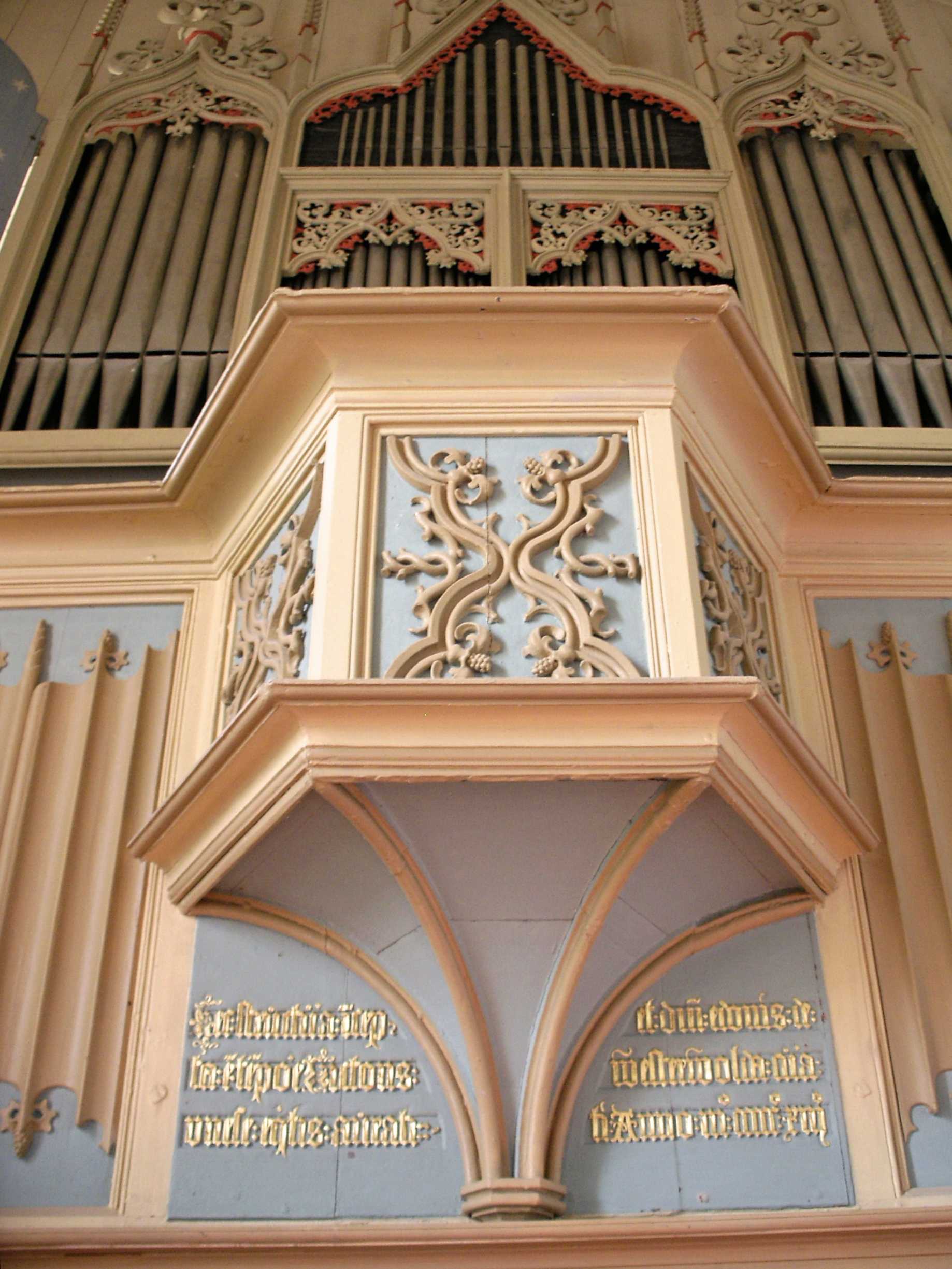 Orgel der Rysumer Kirche, Ostfriesland, Niedersachsen, Deutschland